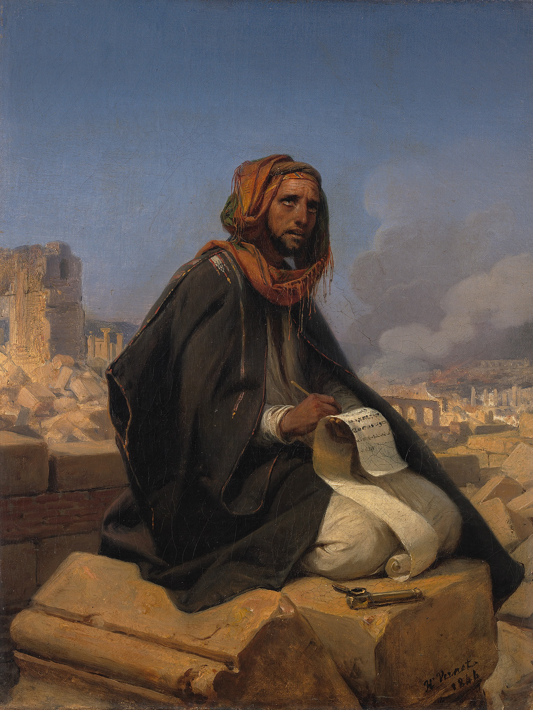 schilderij; bijbelse voorstelling